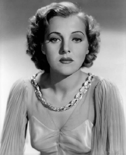 Pat Paterson, foto pubblicitaria